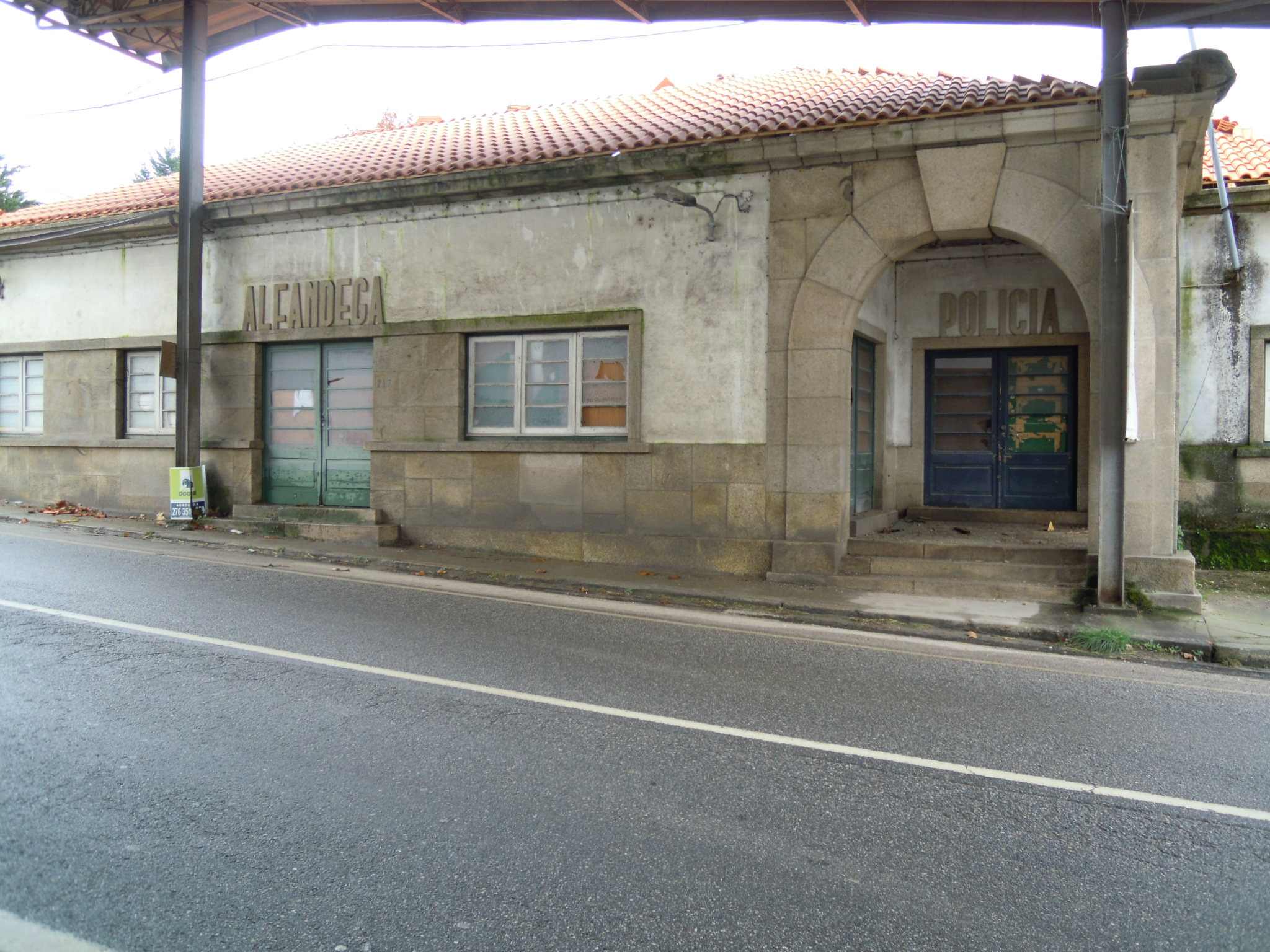 Antigo edificio da alfándega na Raia entre Galiza e Portugal, na freguesía de Vila Verde da Raia (Chaves).